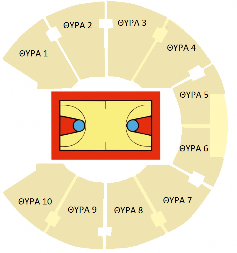 Οι θύρες του Αλεξάνδρειου Μέλαθρου